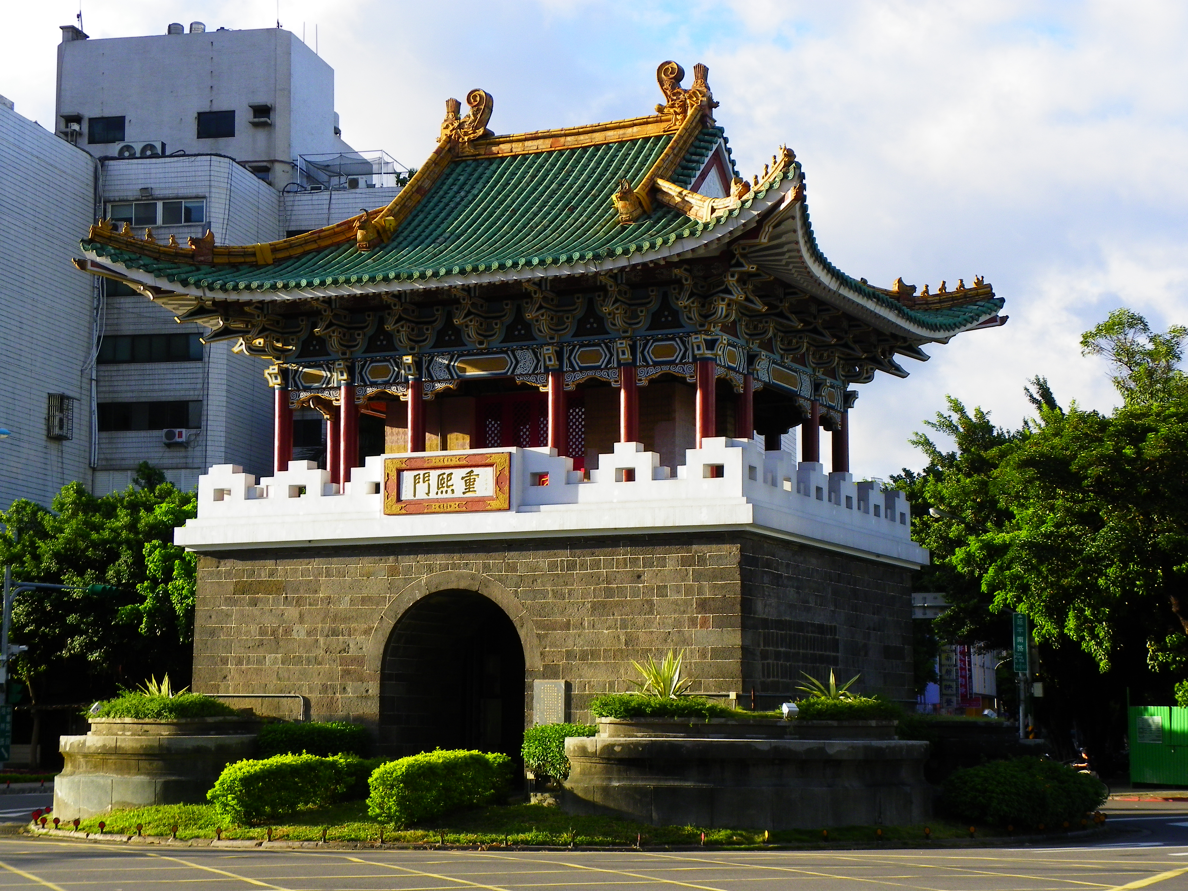 臺北市臺北府城重熙門（小南門）。